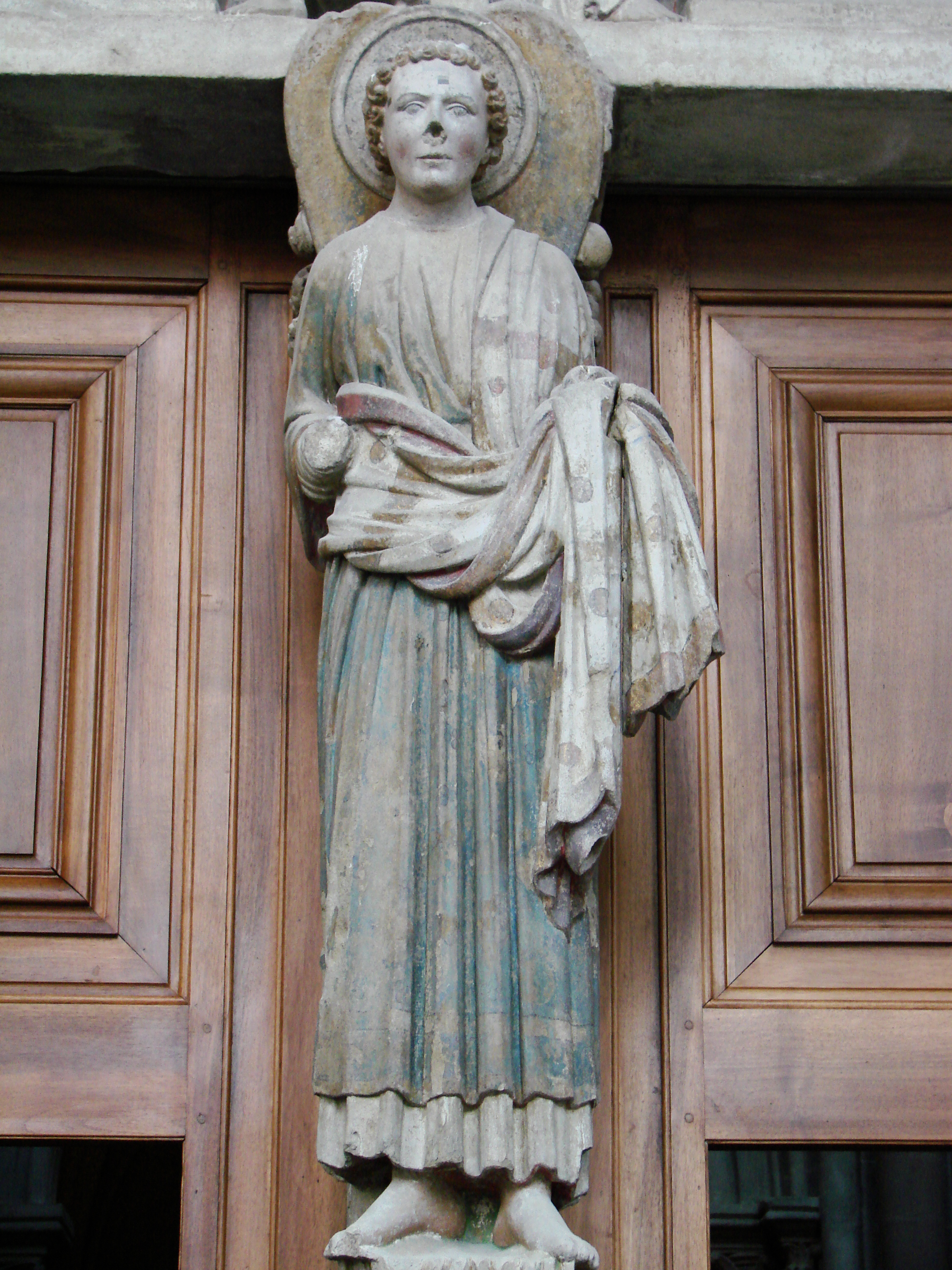 Cathédrale de Lausanne, ville de Lausanne (Suisse) : portail peint de l'entrée latérale de la cathédrale, restauré en 2007.